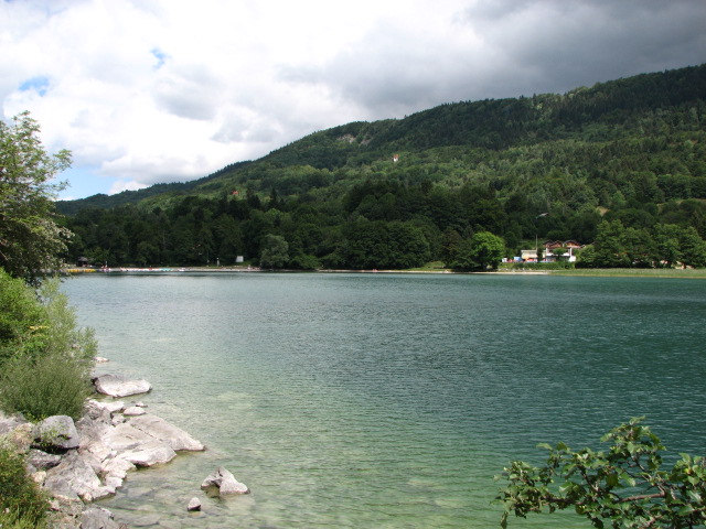 Lac de Laffrey